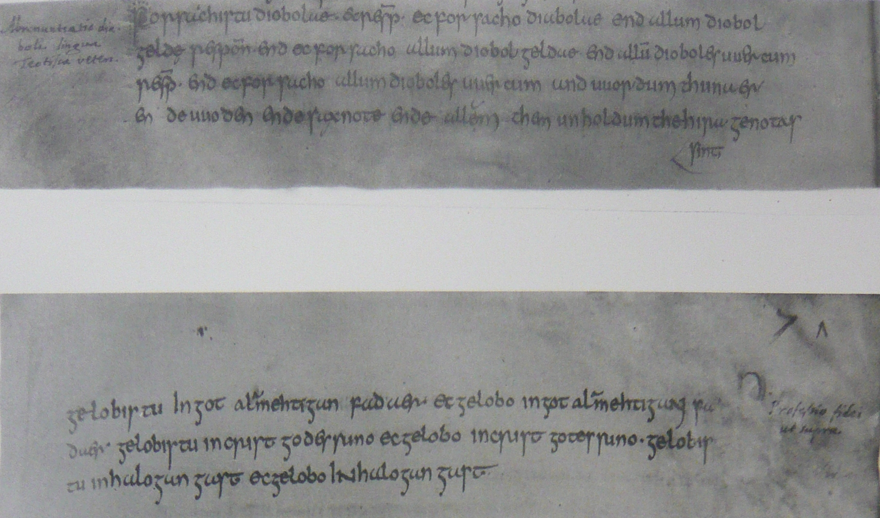 facsimile from: Johan H. Gallée (Hg.), Altsächsische Sprachdenkmäler, Facsimile Sammlung, Leiden 1895, Nr. 11a